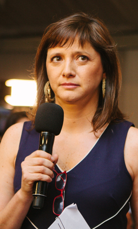 Mónica Pérez, periodista chilena.